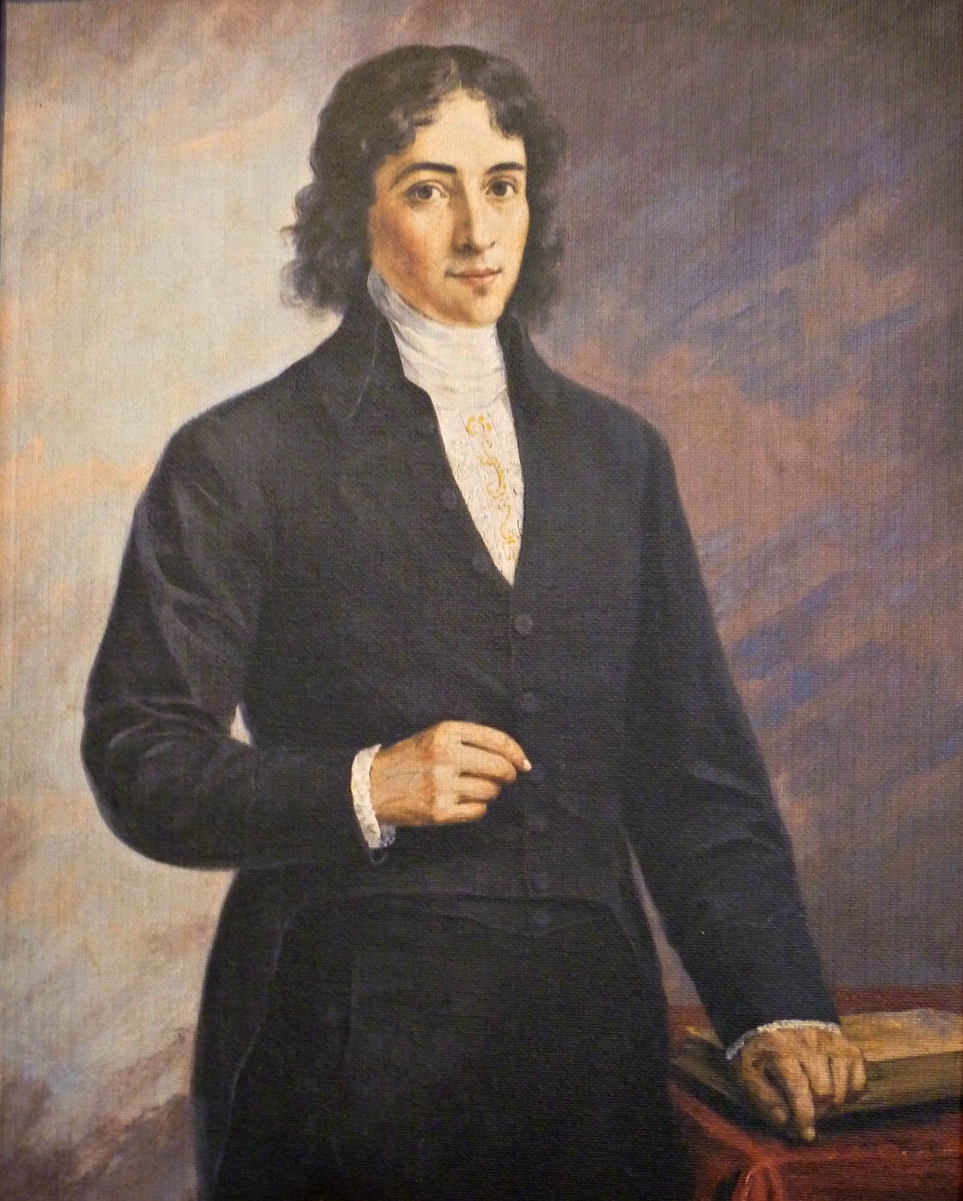 Retrato de José Mejía Lequerica. Óleo sobre lienzo, autor desconocido (S. XVIII). Exhibición del Museo de la Ciudad - Quito DM.